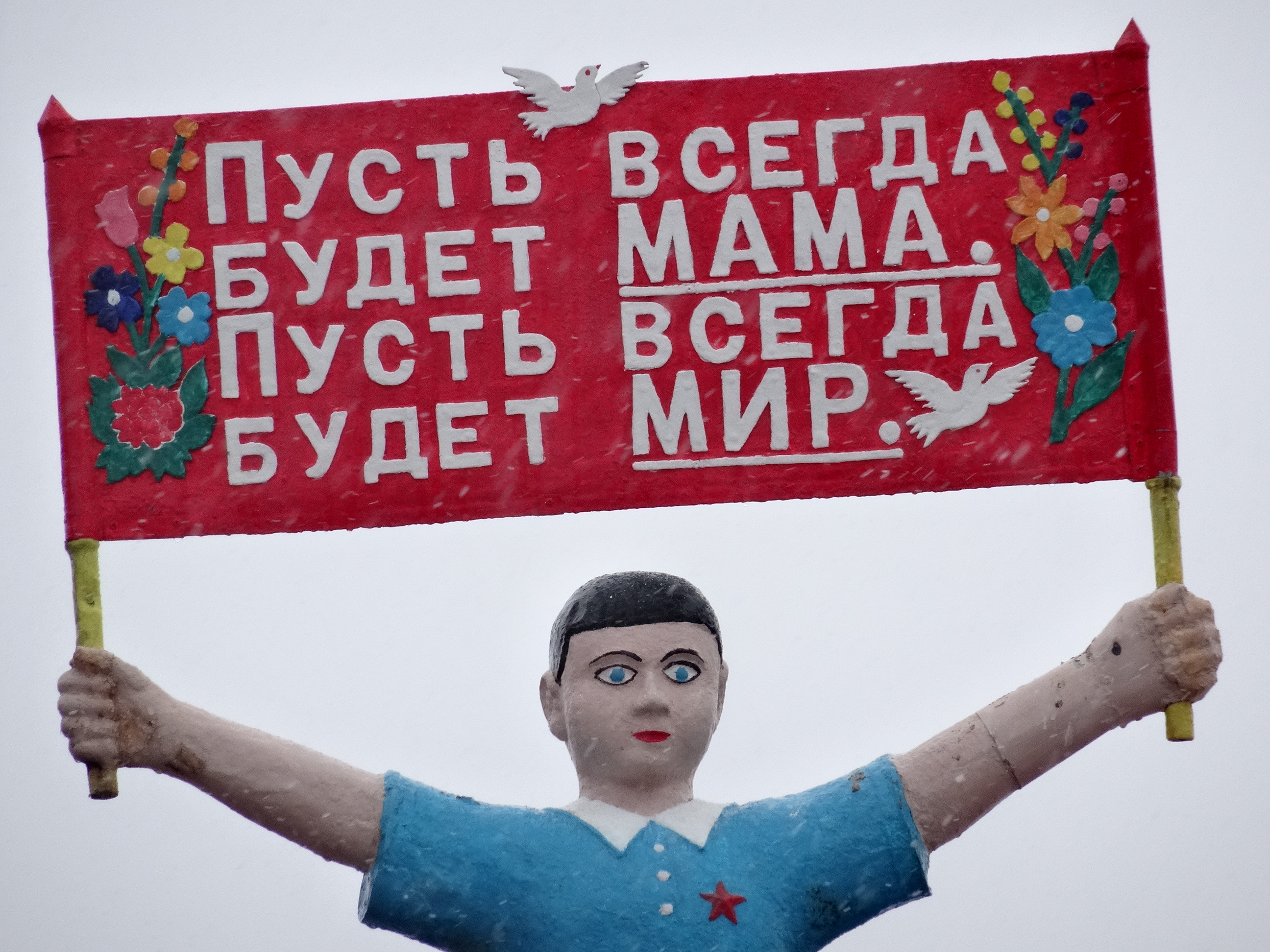 Figuren am Kirillow-Haus im russischen Dorf Kunara, nahe Newjansk die den Liedtext von Pust wsegda budet solnze auf Tafel halten